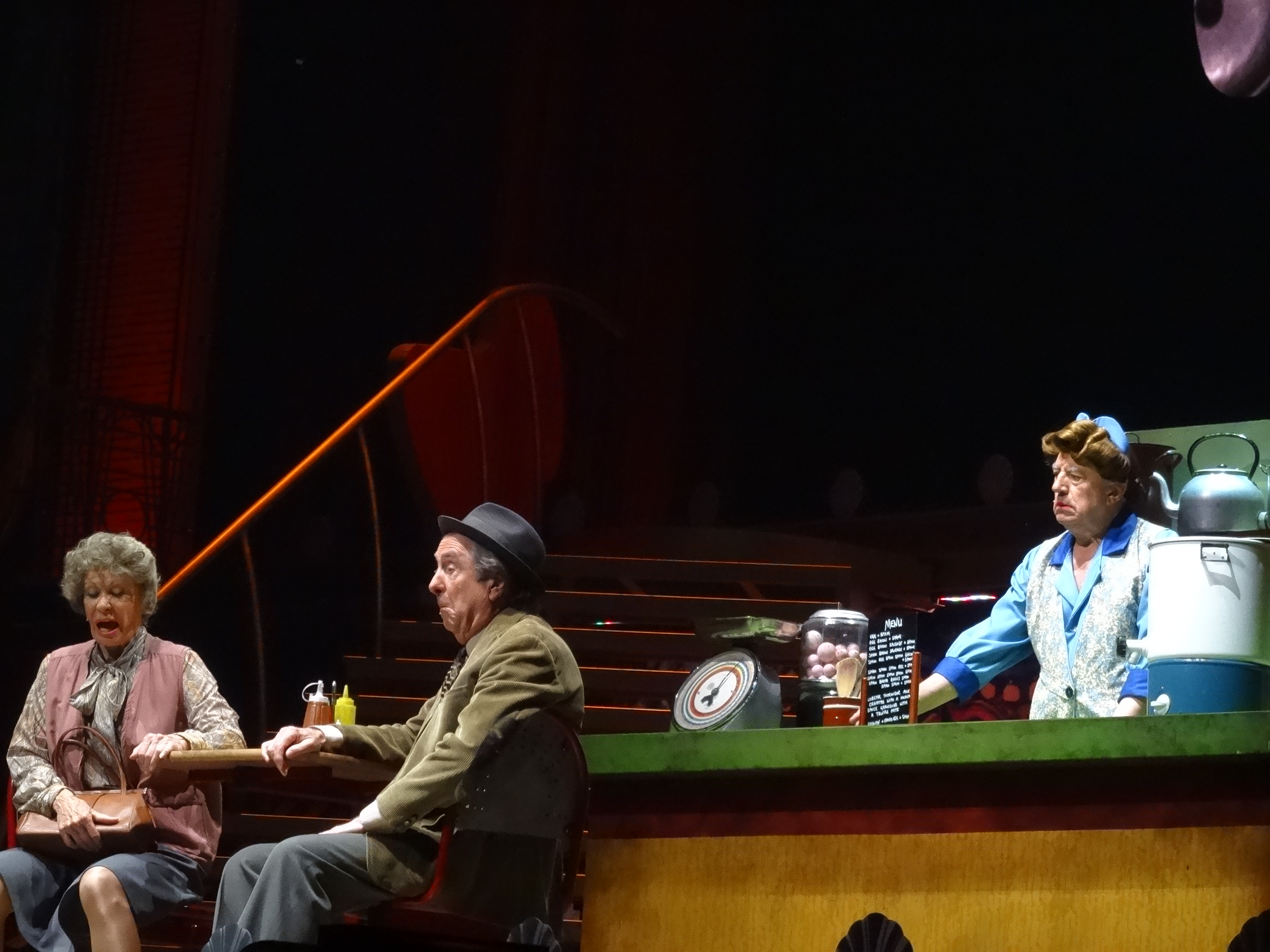 Photo 02-07-14 13 05 04